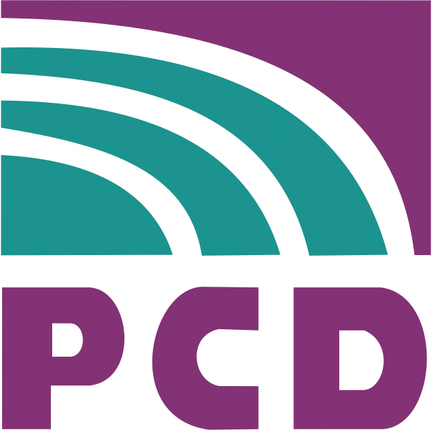 Emblema del antiguo Partido de Centro Democrático (PCD) de México, el PCD fue liquidado como partido político en 2000 al perder su registro legal. Al ocurrir esto desapareció como entidad legal ante la ley mexicana y ninguna otra organización fue su sucesora en su denominación o emblema Seal of the ancient Democratic Centre Party (PCD) of México, the PCD was existed untill 2000, when was disolved after lost his legal register. The PCD was disapered like a organization for the mexican electoral law and any other organization keep the name of seal.